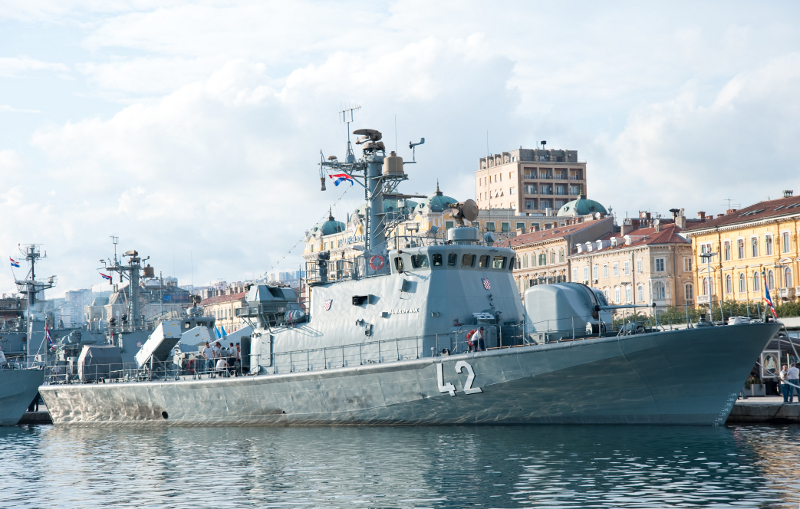 Dan HRM-a, Rijeka